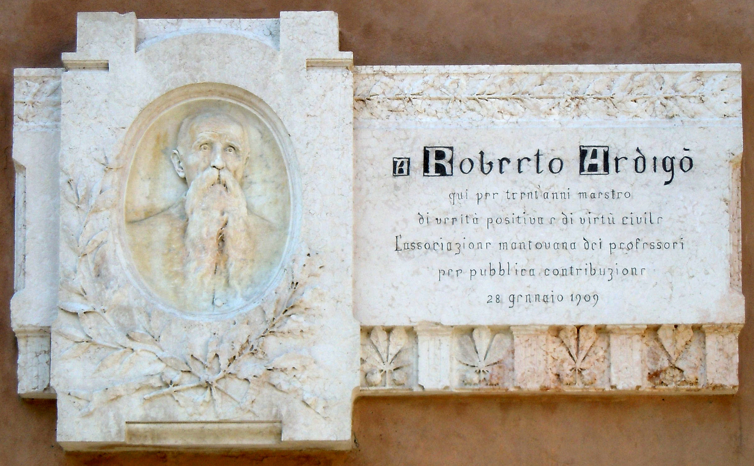 Mantova, lapide a Roberto Ardigò.